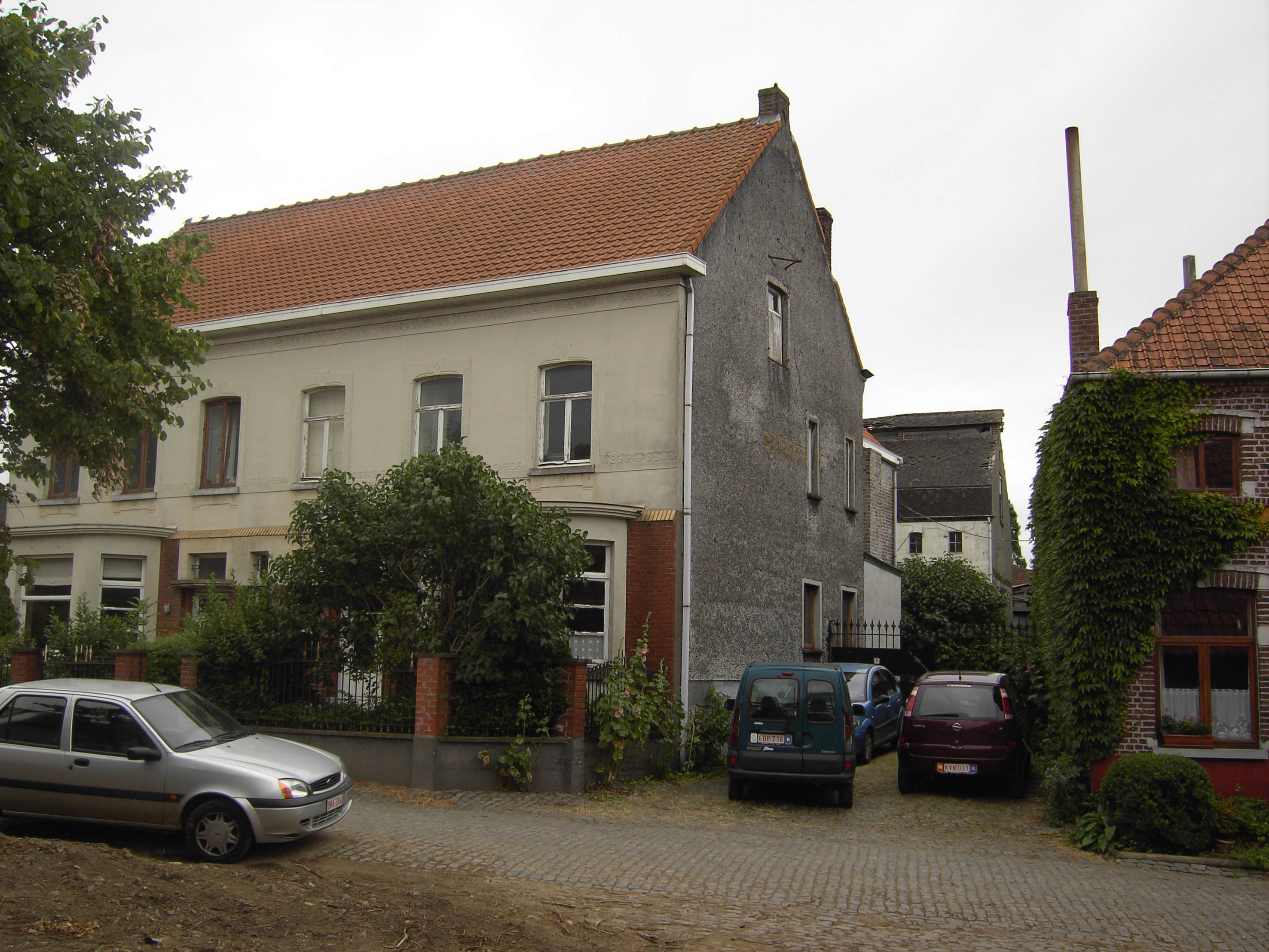 Dikkele - Zwalm - België - In deze tweewoonst woonde de brouwersfamilie De Wever. Op de achtergrond een stukje van de vroegere brouwerij.